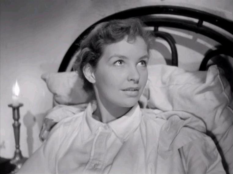 Odile Versois in Anselmo ha fretta